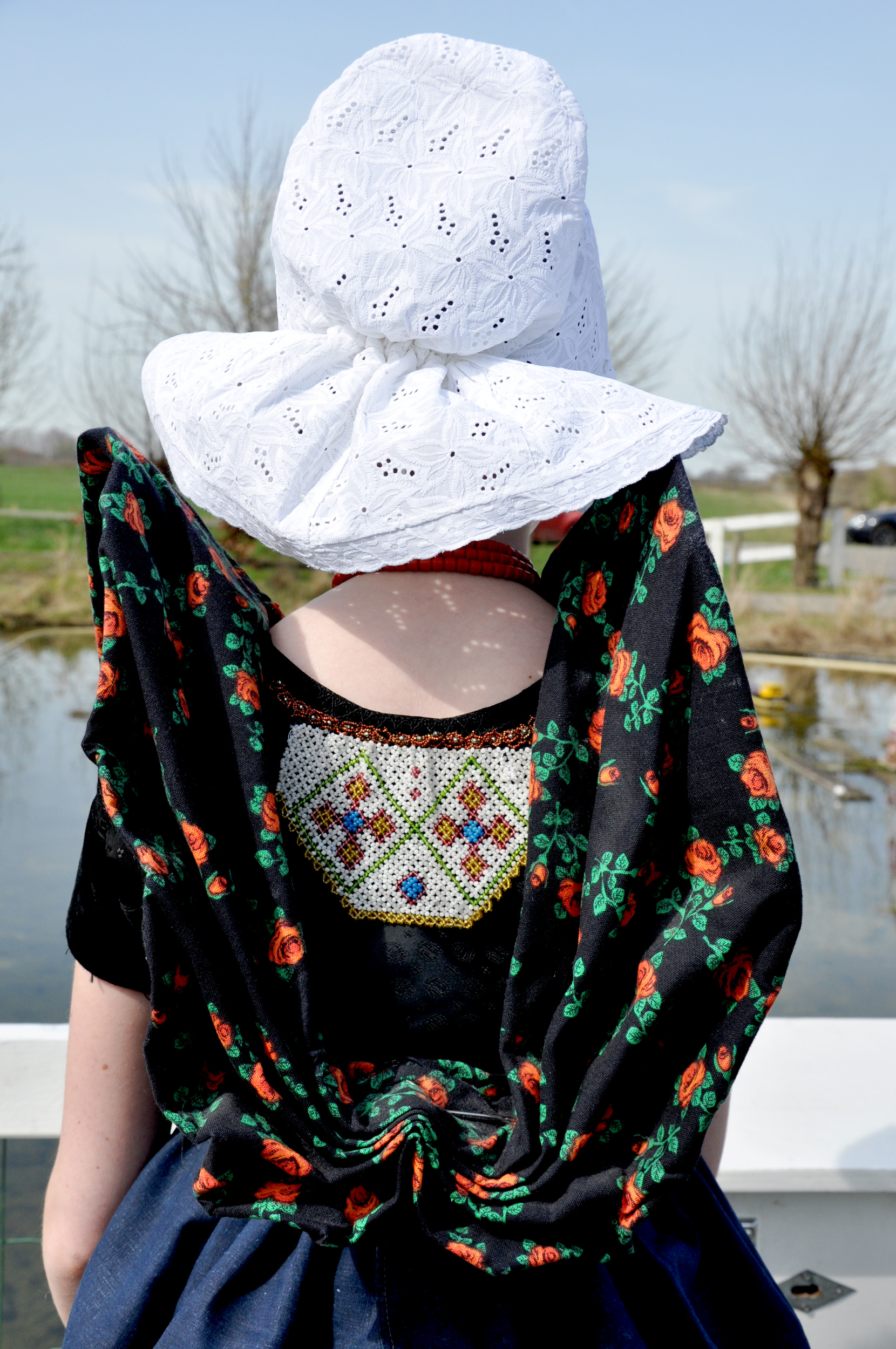 Axels klederdracht vleugels en kanten muts